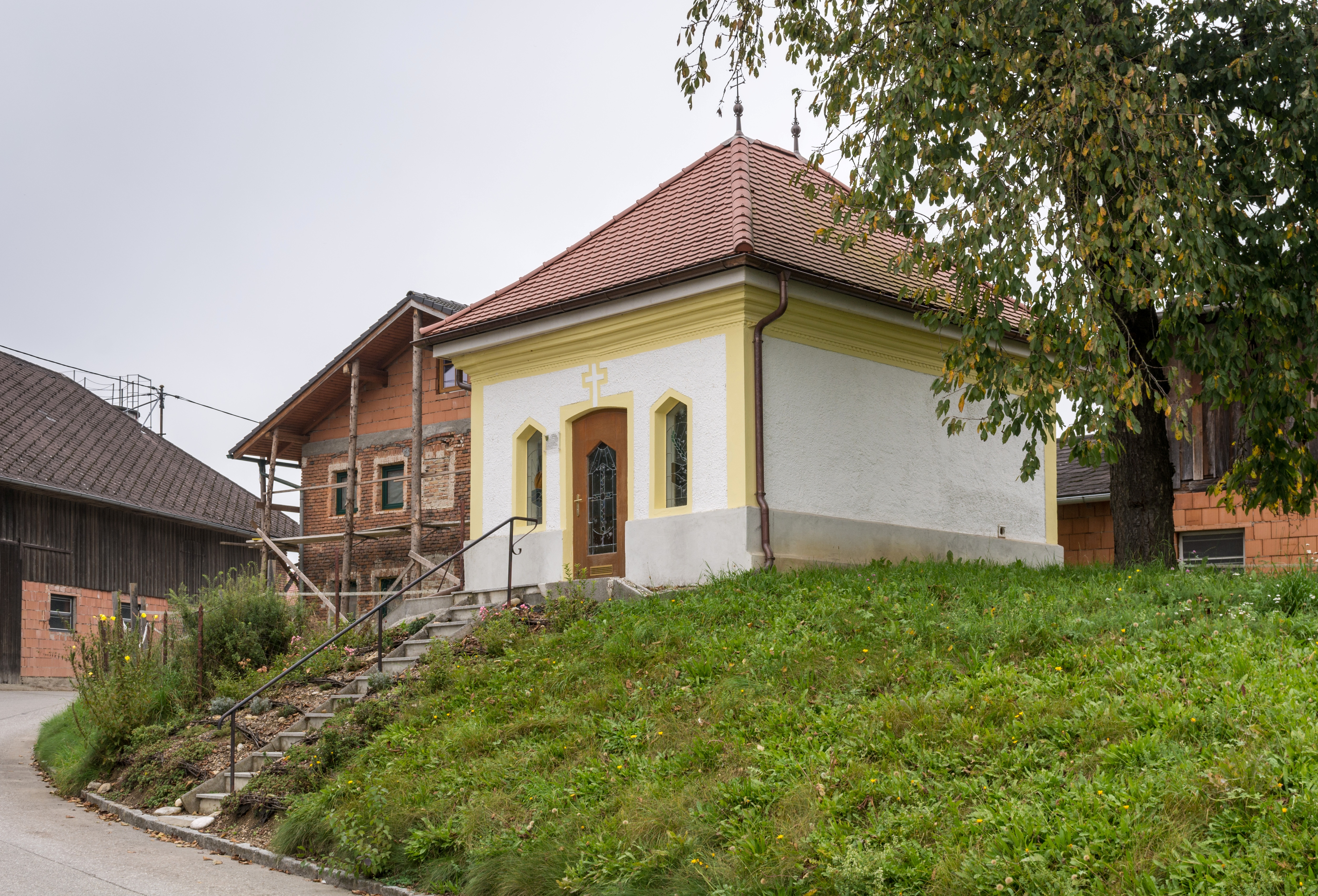 Die Gemeindekapelle von Pitzenberg wurde anstelle einer verfallenen mittelalterlichen Kirche errichtet.